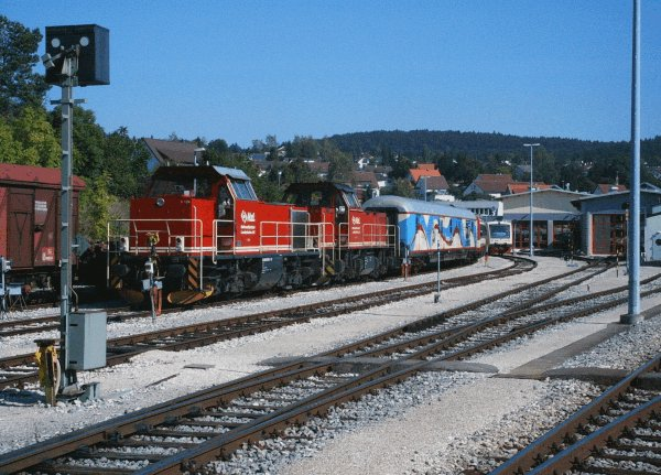 Foto der HzL-Diesellok V 124 im Bahnbetriebswerk Gammertingen